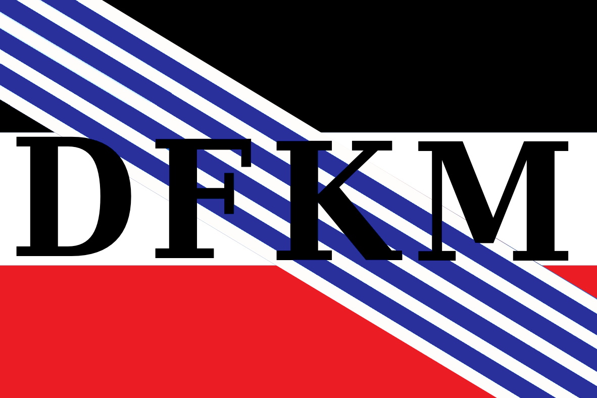 Bandera del desaparecido equipo uruguayo de fútbol Deutscher Fussball Klub